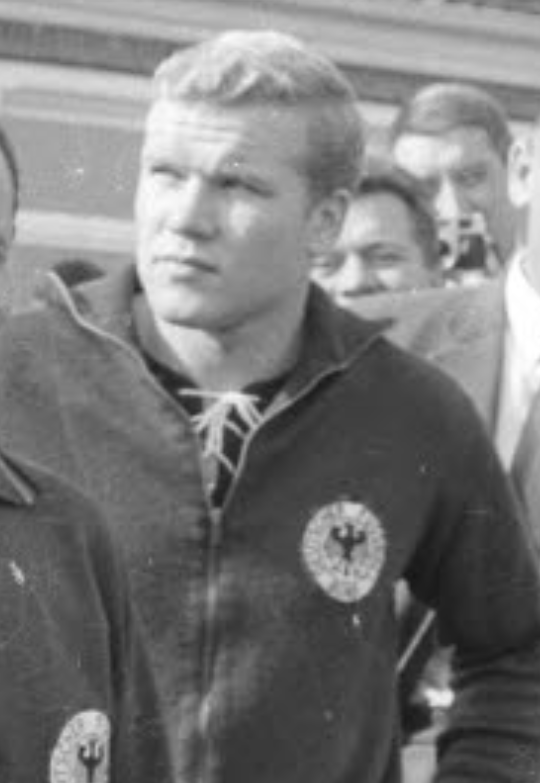 Klaus-Dieter Sieloff en 1965